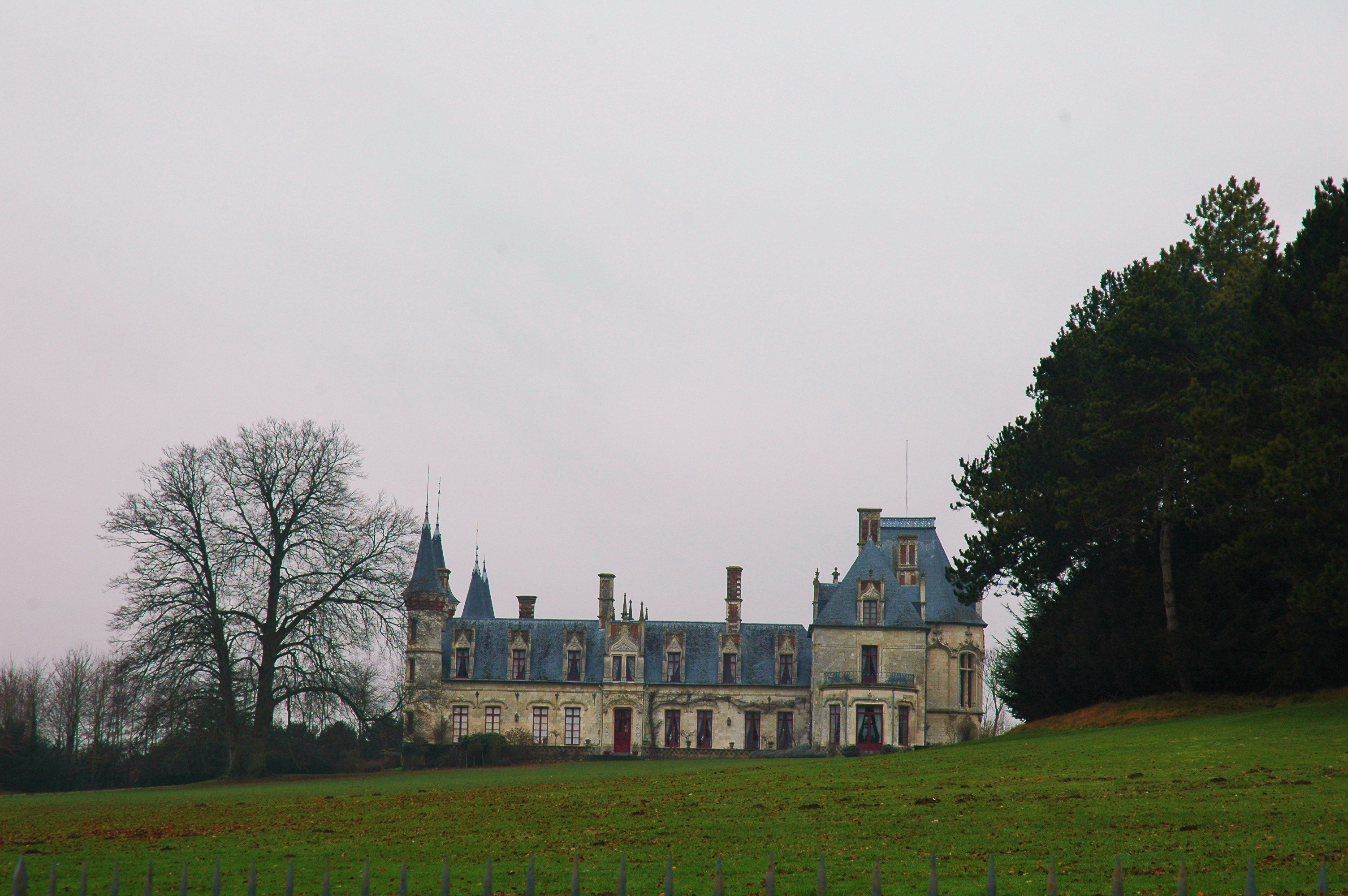 chateau de style"gothique troubadour" XVI-XIX siecle